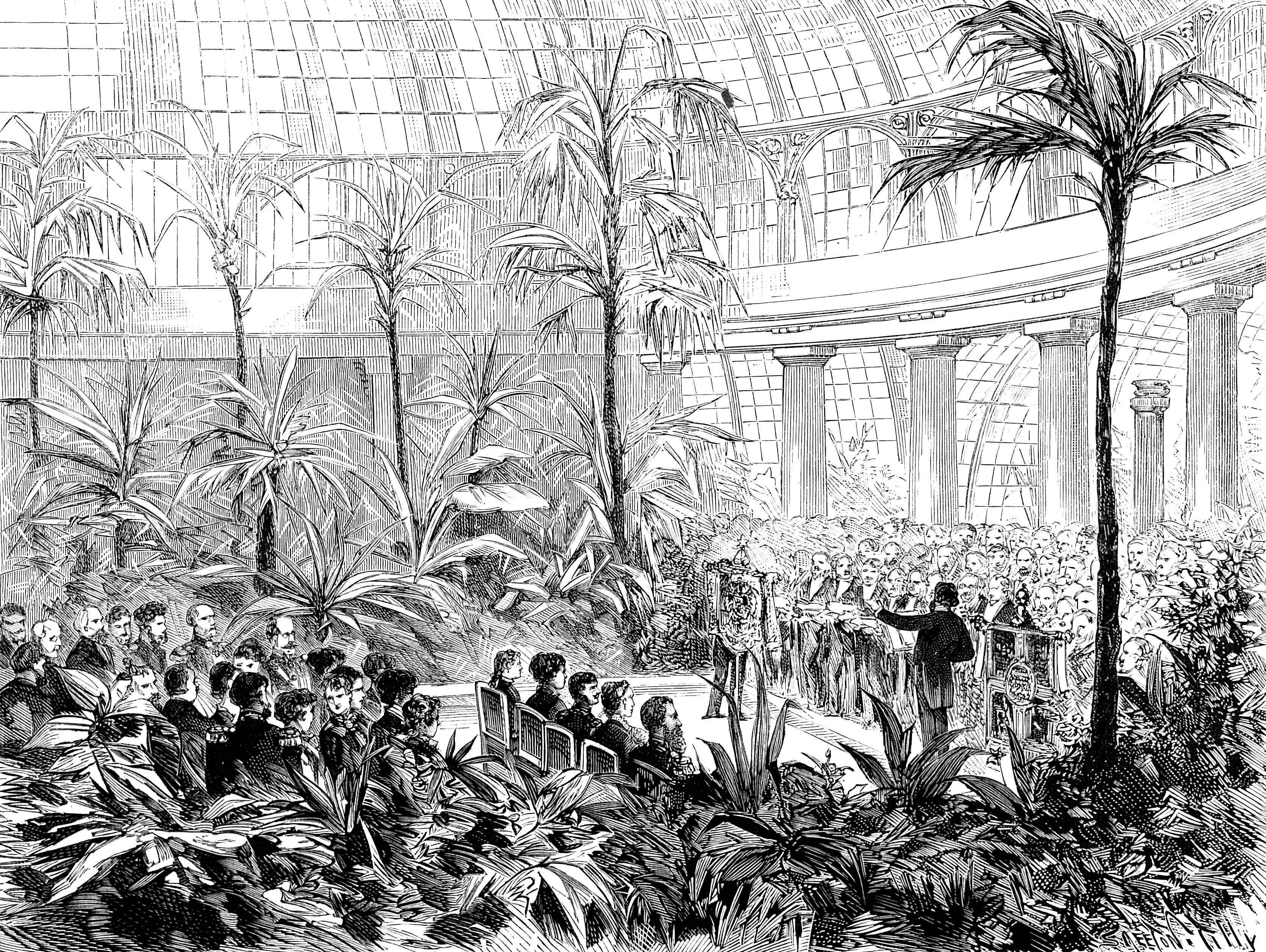 Aubade à l’occasion du mariage de la princesse Stéphanie de Belgique avec l’archiduc Rodolphe d’Autriche, château de Laeken, le 20 mai 1880.